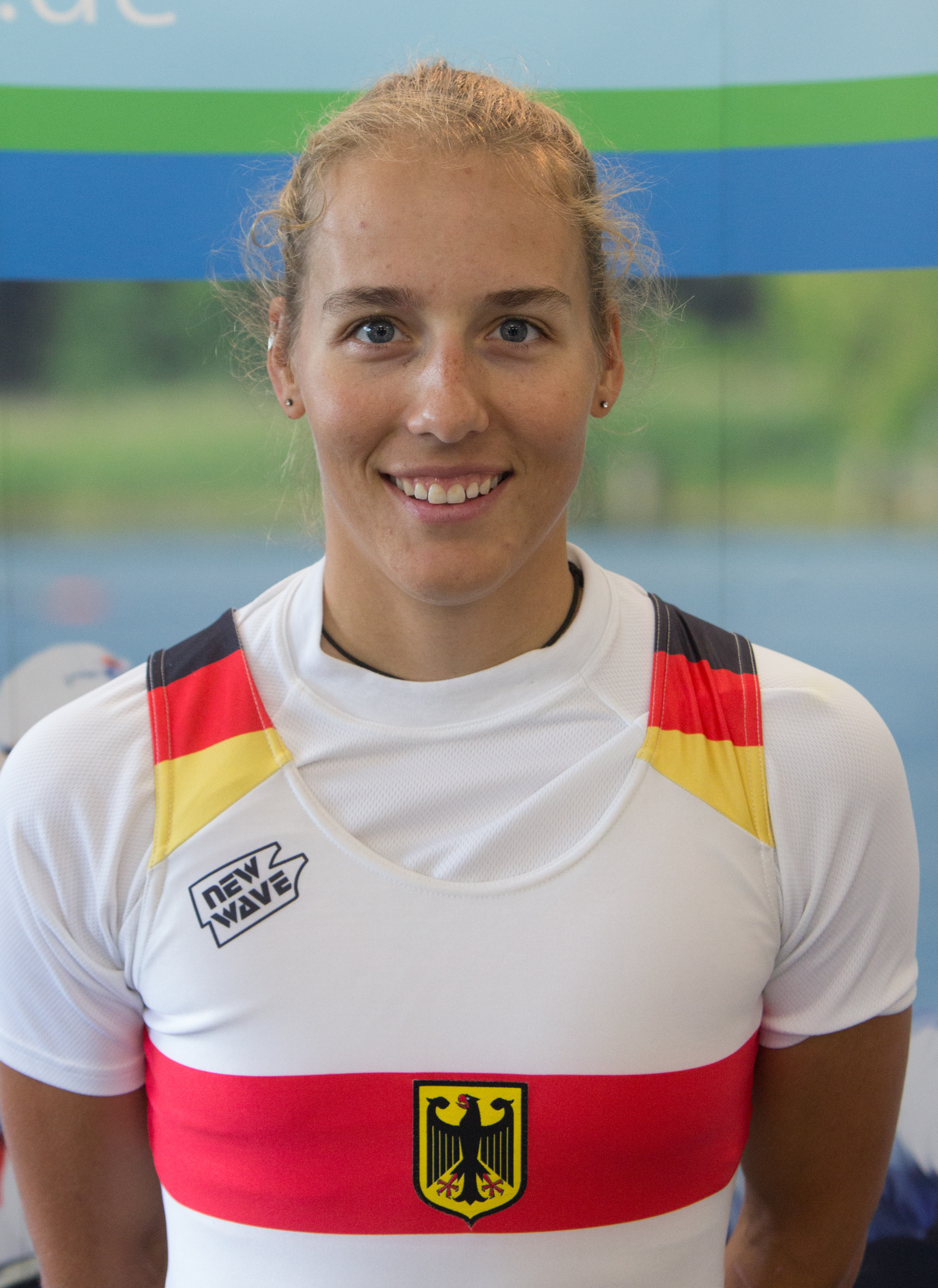 Medientag des Ruderverbandes in der Ruderakademie Ratzeburg am 6. September 2017: Marie-Cathérine Arnold